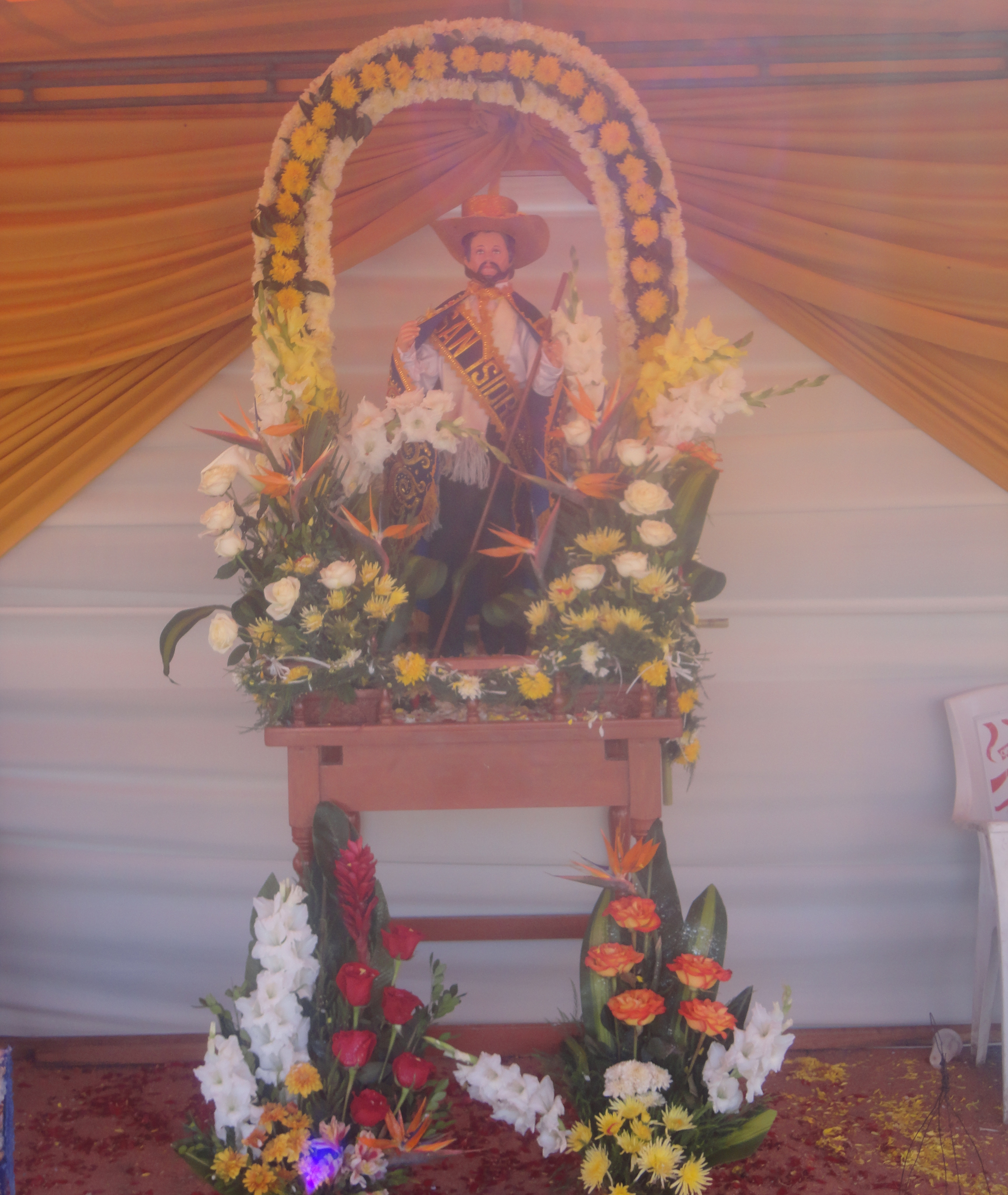 san isidro tacna